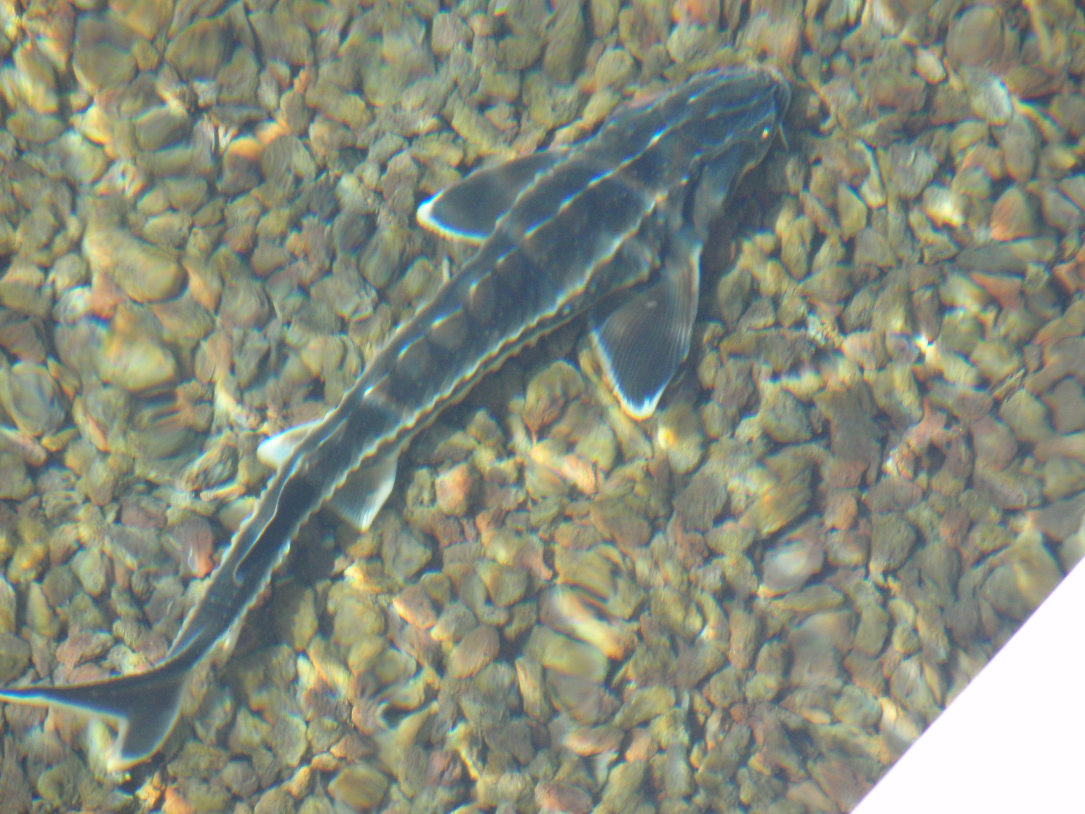 Acipenser gueldenstaedti